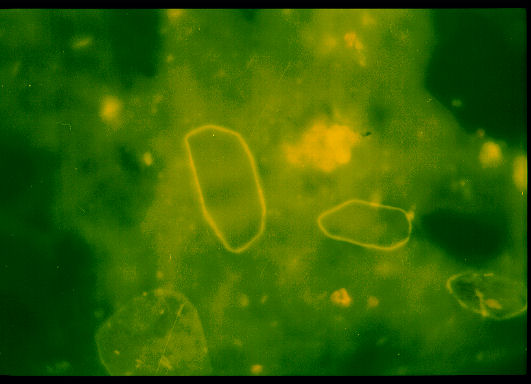 Kristalle im Urin Zwei weiße eckige Cystinkristalle? Fluoreszenz Akridinorange-Färbung